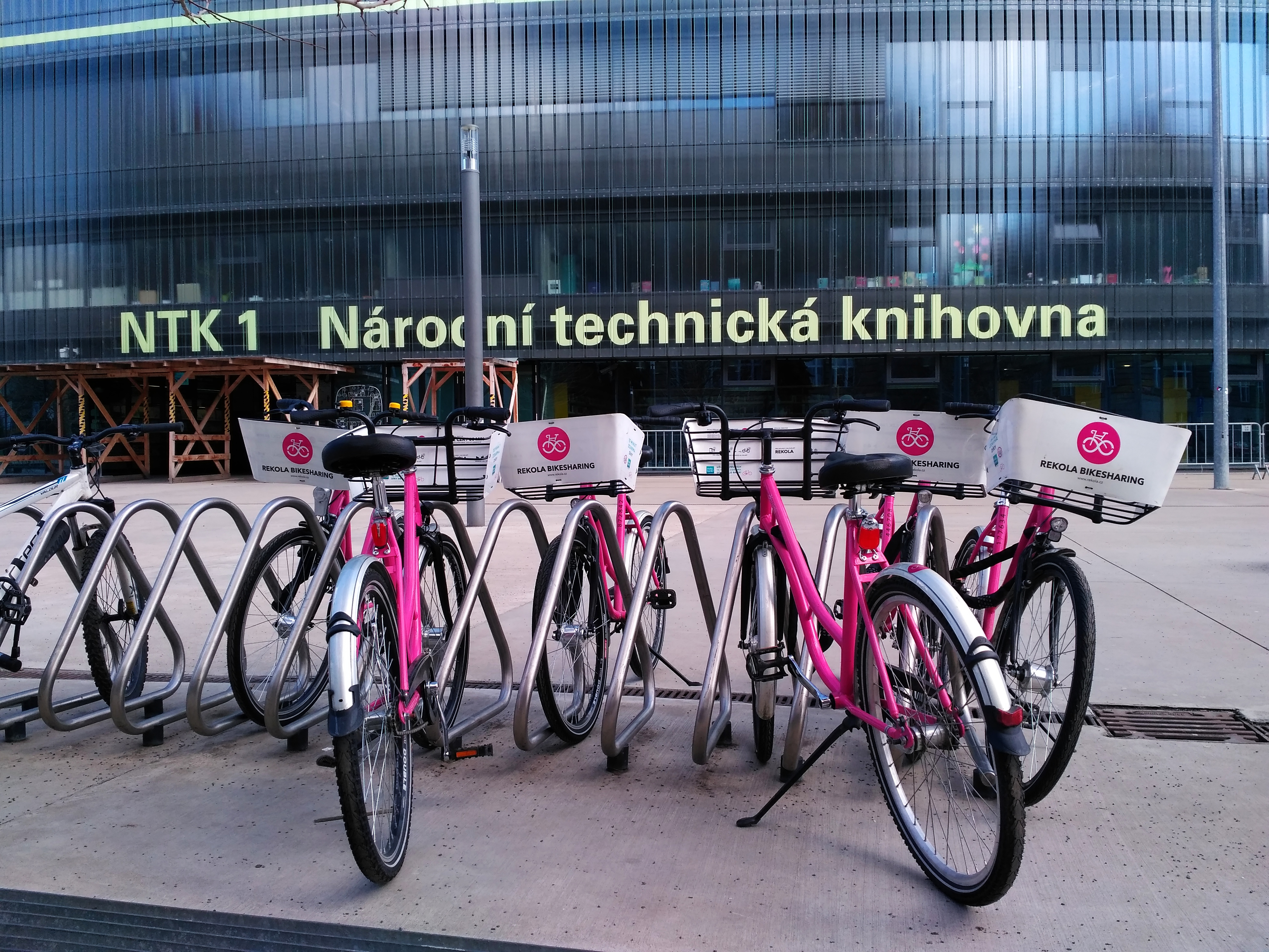 Rekola před Národní technickou knihovnou. Vchod do knihovny koupené od developerské společnosti Sekyra Group podnikatele Luďka Sekyry kryje dřevěné lešení, které má snížit pravděpodobnost zranění návštěvníků knihovny v případě pádu skleněných plátů tvořících plášť budovy.